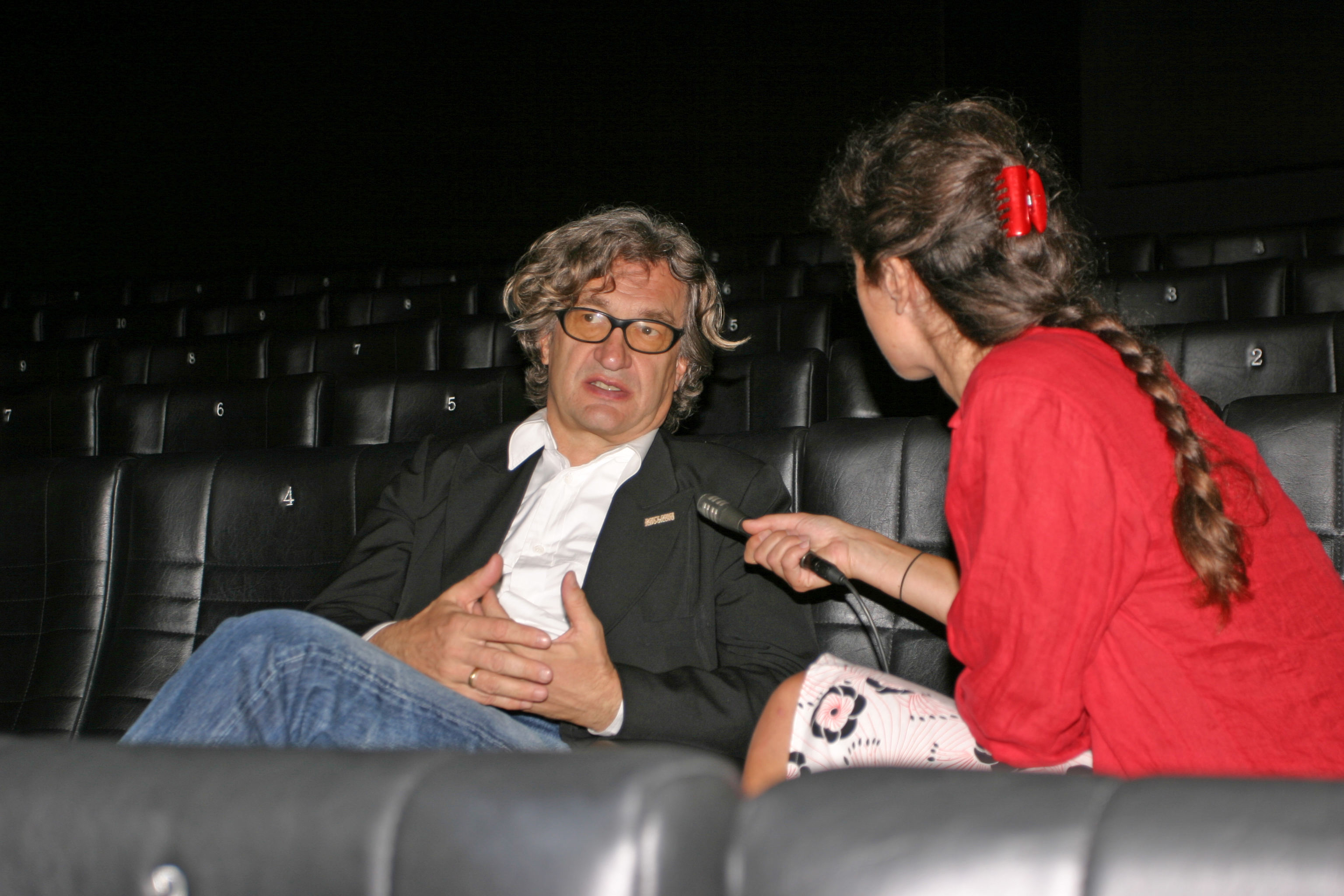 Barbara Strebel von ArtCast befragt Wim Wenders anlässlich seines Besuches in Basel zur Lancierung von Buch und Film "Don't come knocking!"